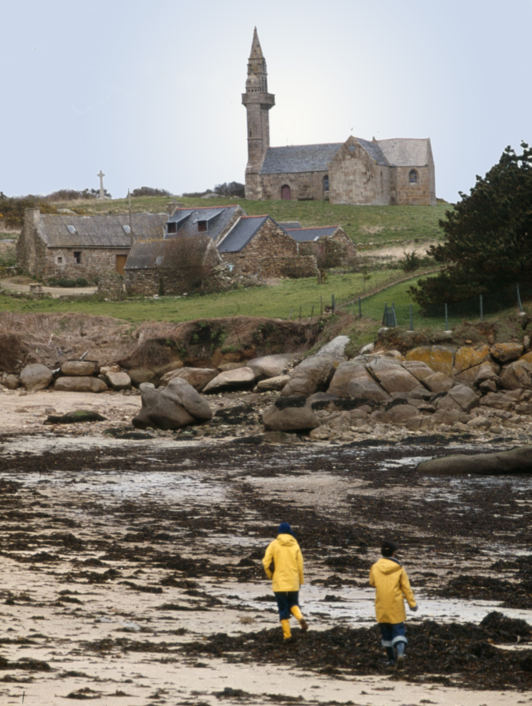 Carantec, Callot 1978